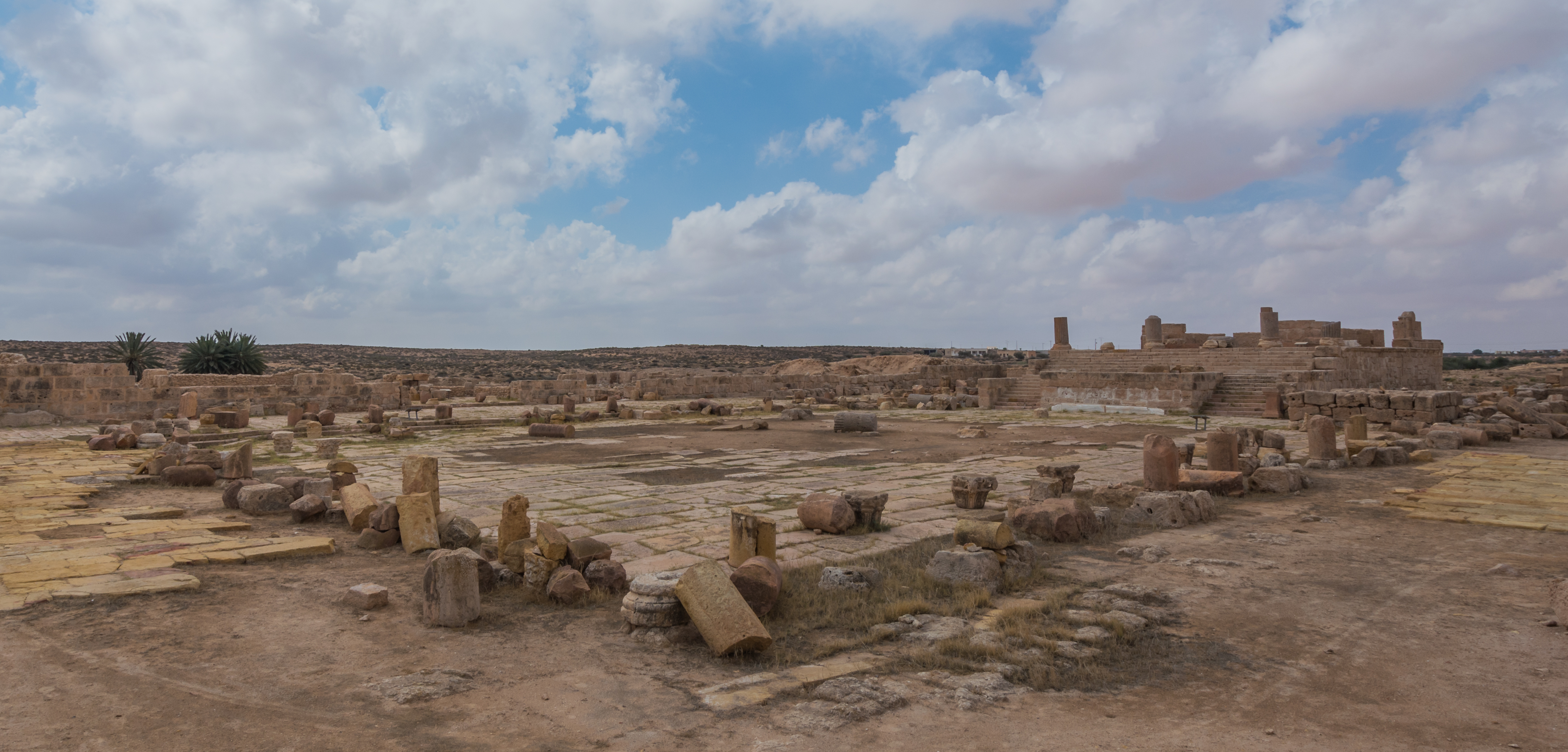 Forum et ses annexes